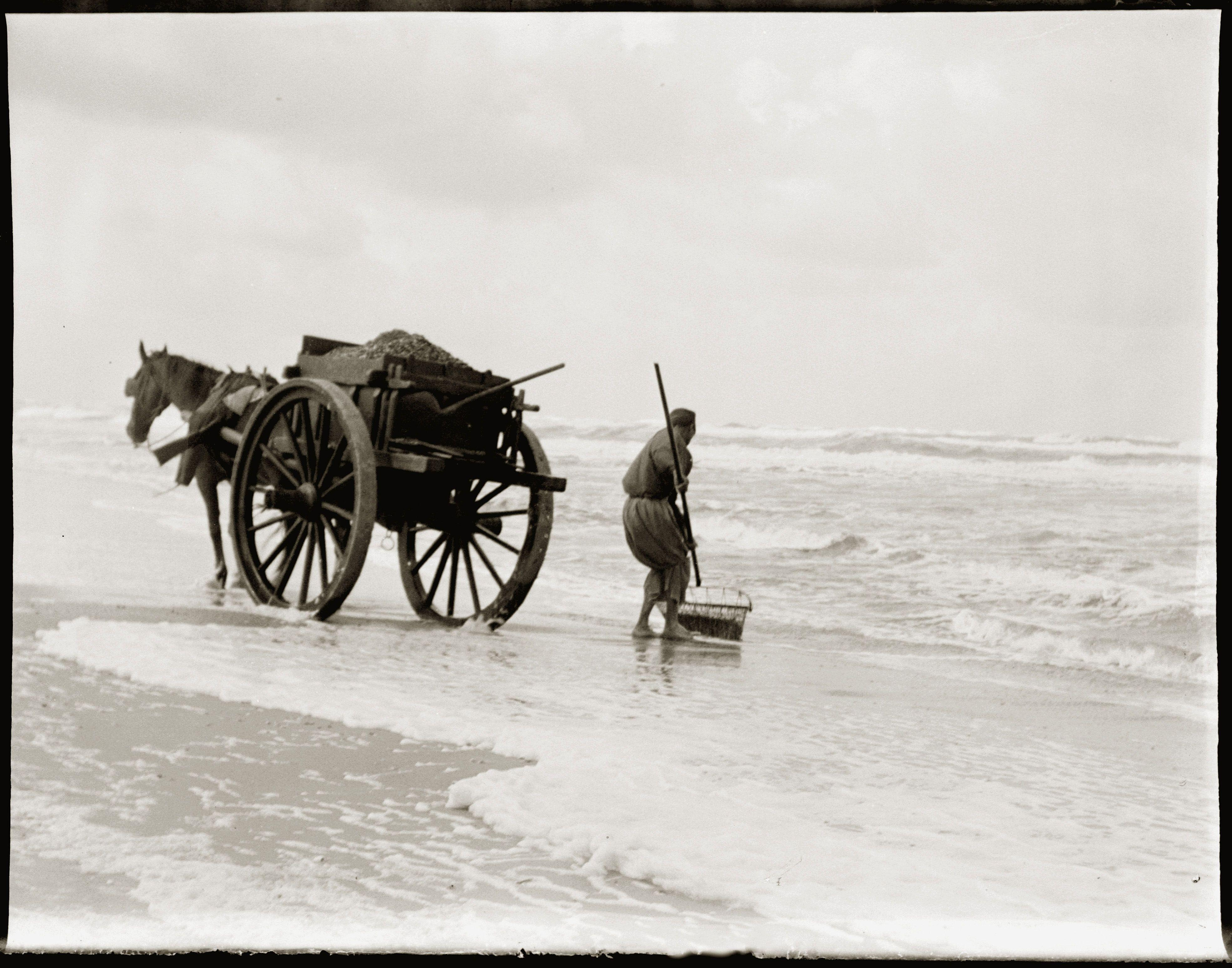 Beschrijving Egmond aan Zee Schelpenvisser op het strand. Documenttype foto Vervaardiger Olie``, Jacob (1834-1905) Collectie Collectie Jacob Olie Jbz. Datering augustus 1904 Inventarissen Afbeeldingsbestand 10019A001583 Generated with Dememorixer